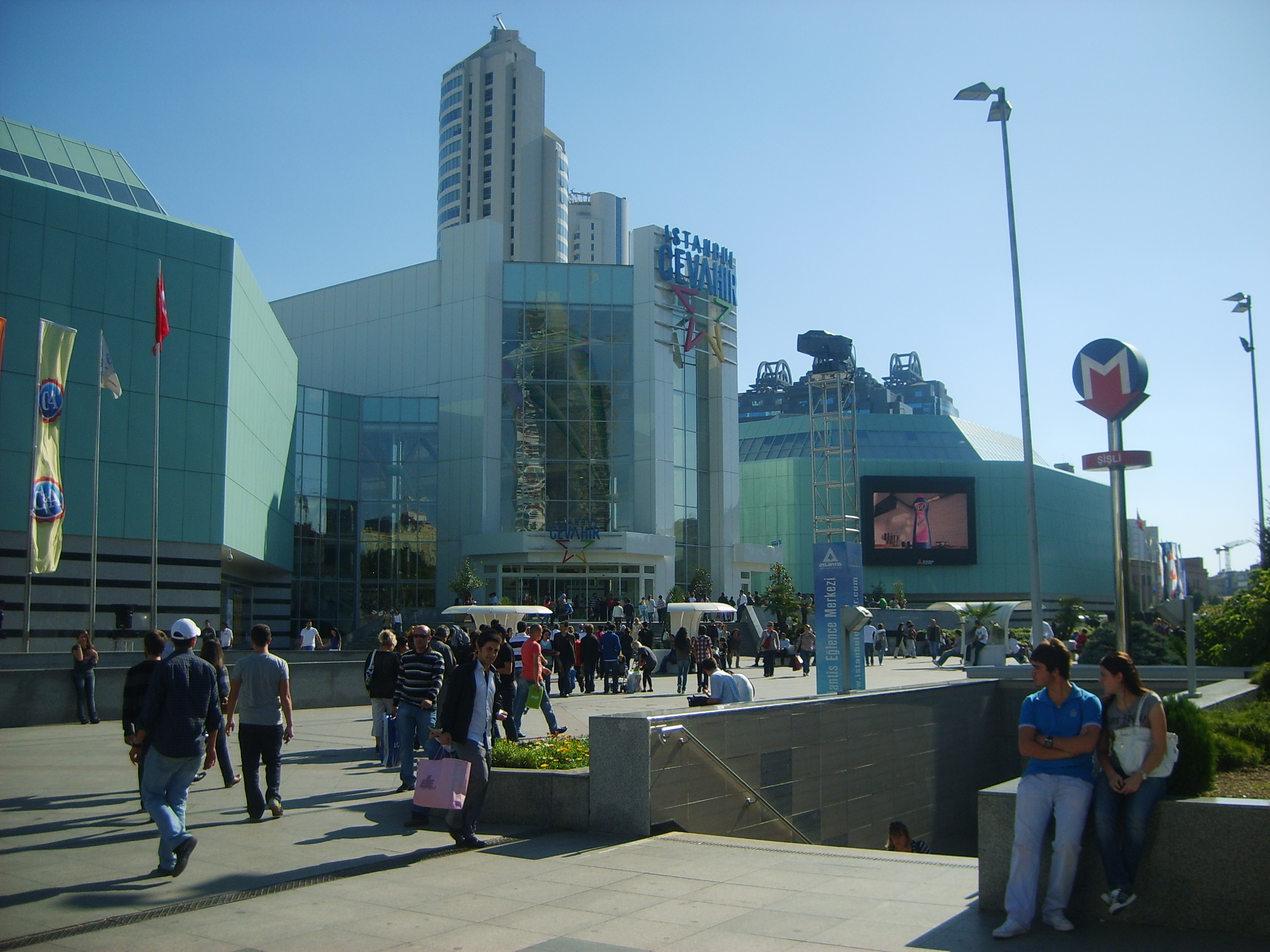 Istanbul Metrosu Şişli istasyonu Fulya girişi